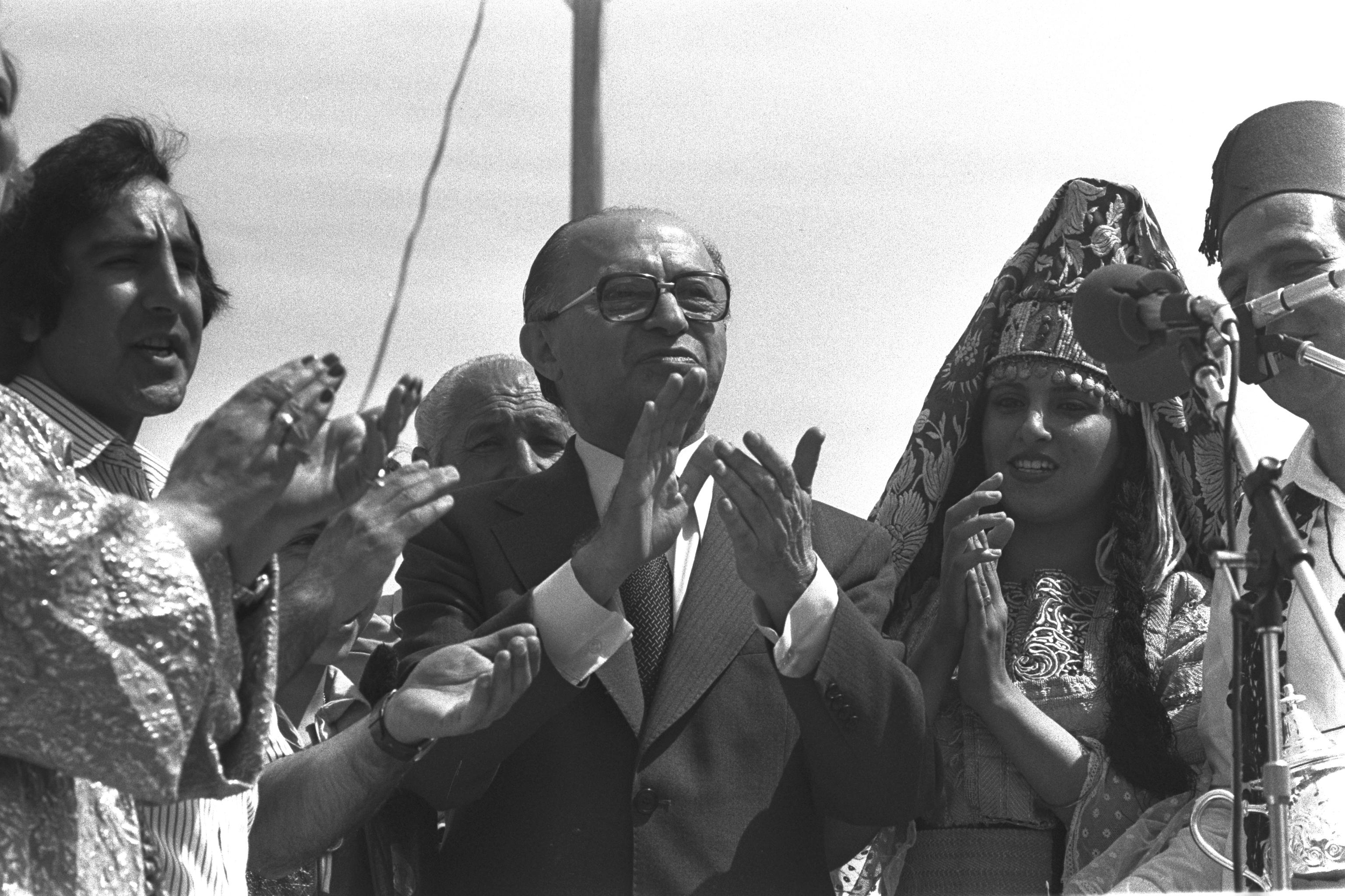 PRIME MINISTER MENACHEM BEGIN AT MIMOUNA CELEBRATIONS IN JERUSALEM. ראש הממשלה, מנחם בגין, בחגיגות המימונה בירושלים Photo: HERMAN CHANANIA, 04/19/1979